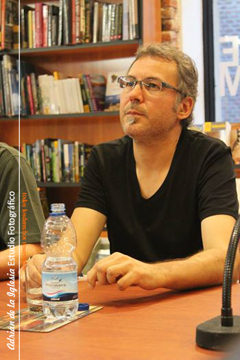 Presentación en librería Oletvm